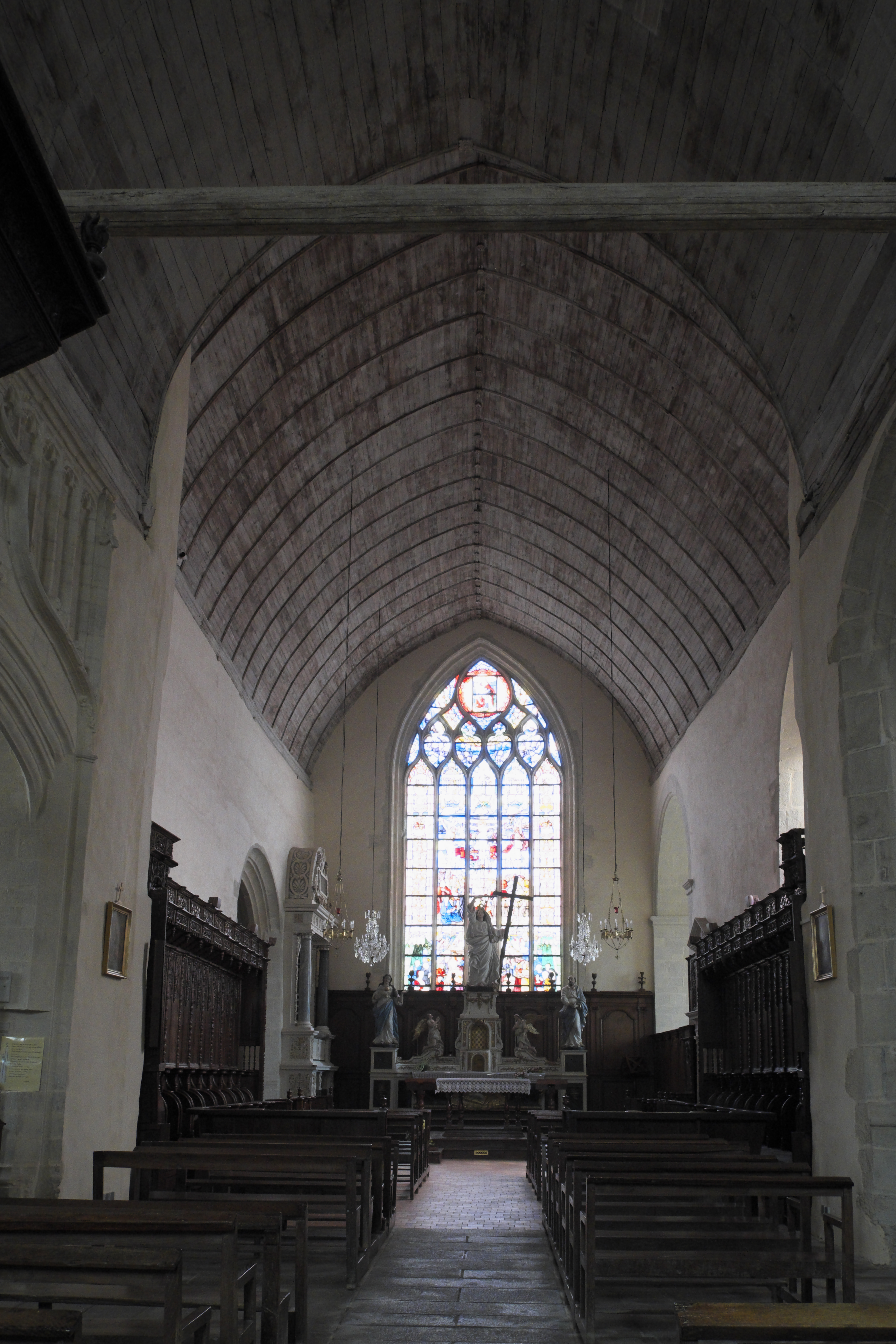 Kirche Sainte-Marie-Madeleine, ehemalige Stiftskirche Notre-Dame, in Champeaux im Département Ille-et-Vilaine (Region Bretagne/Frankreich), Innenraum, Chorgestühl aus dem 16. Jahrhundert